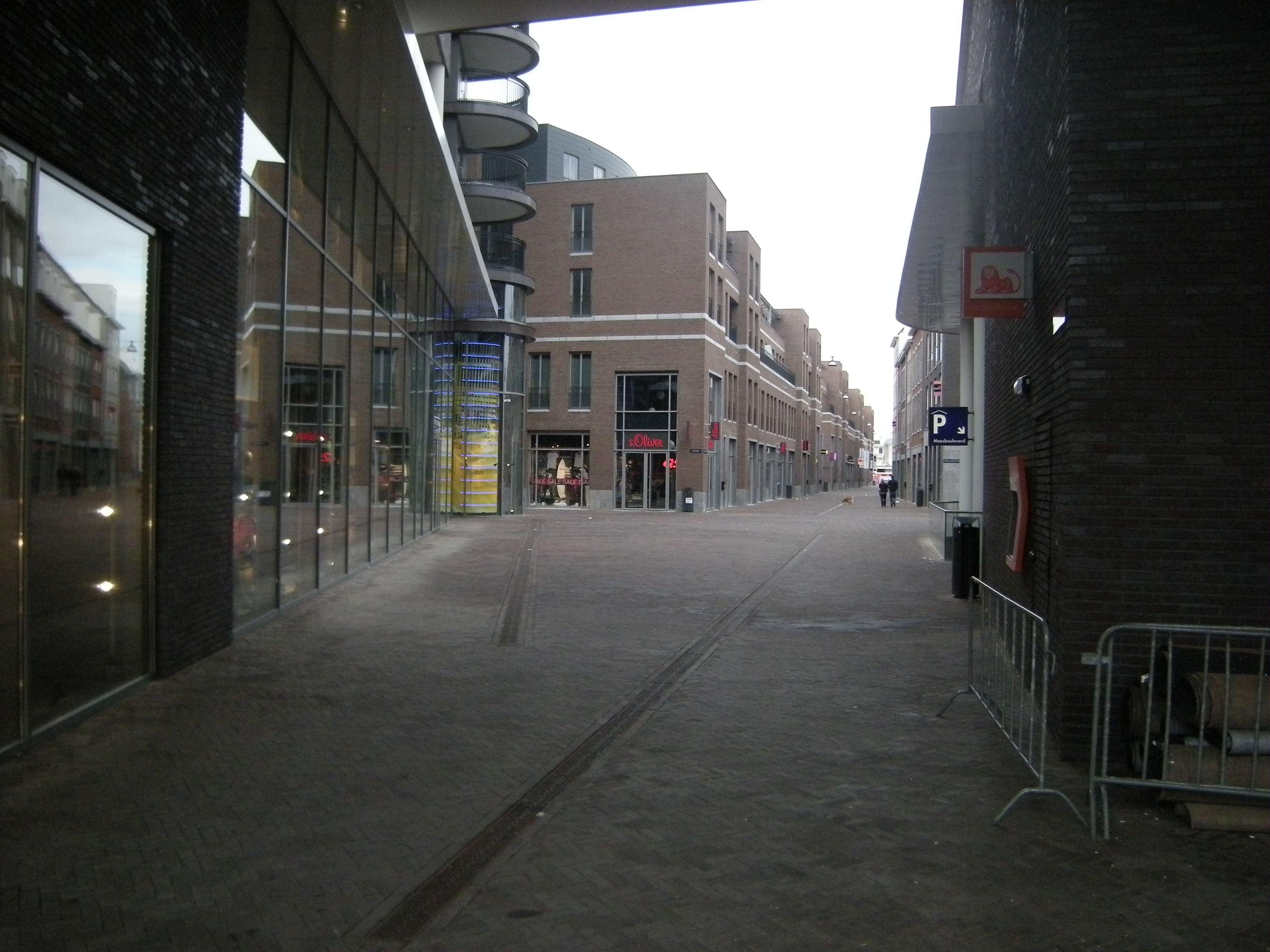 Tegelpoort met zicht op de Maasstraat